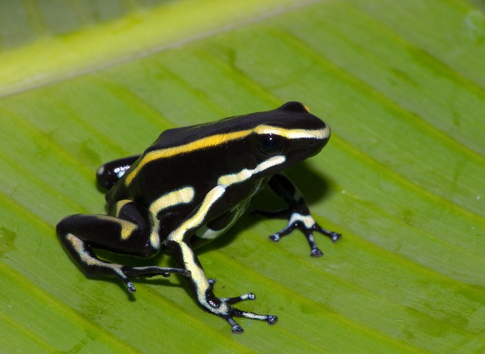 Dendrobates truncatus